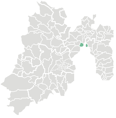 locatie van de gemeente Tlalnepantla de Baz in Mexico (staat)